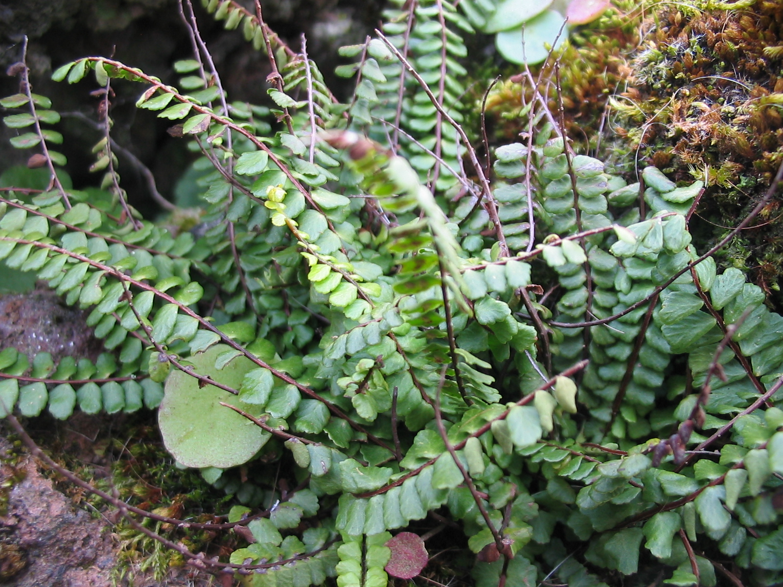 Azoreanischer Strichfarn (Asplenium azoricum) - Habitus